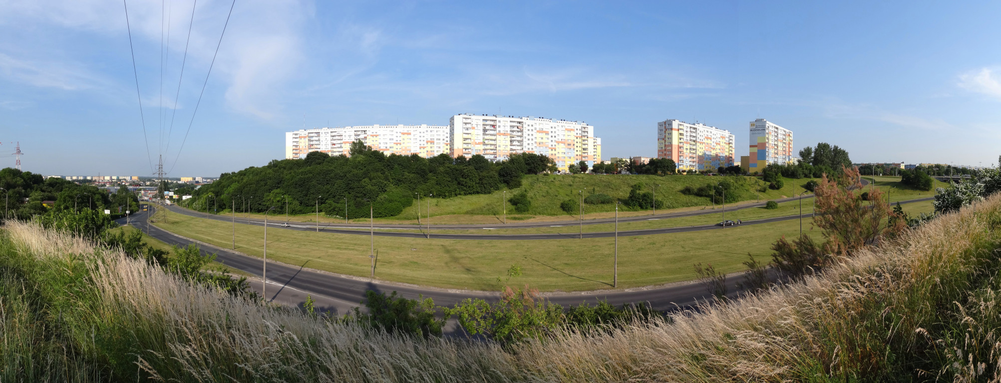 Osiedle Wyżyny w Bydgoszczy - widok ze Wzgórza Wolności